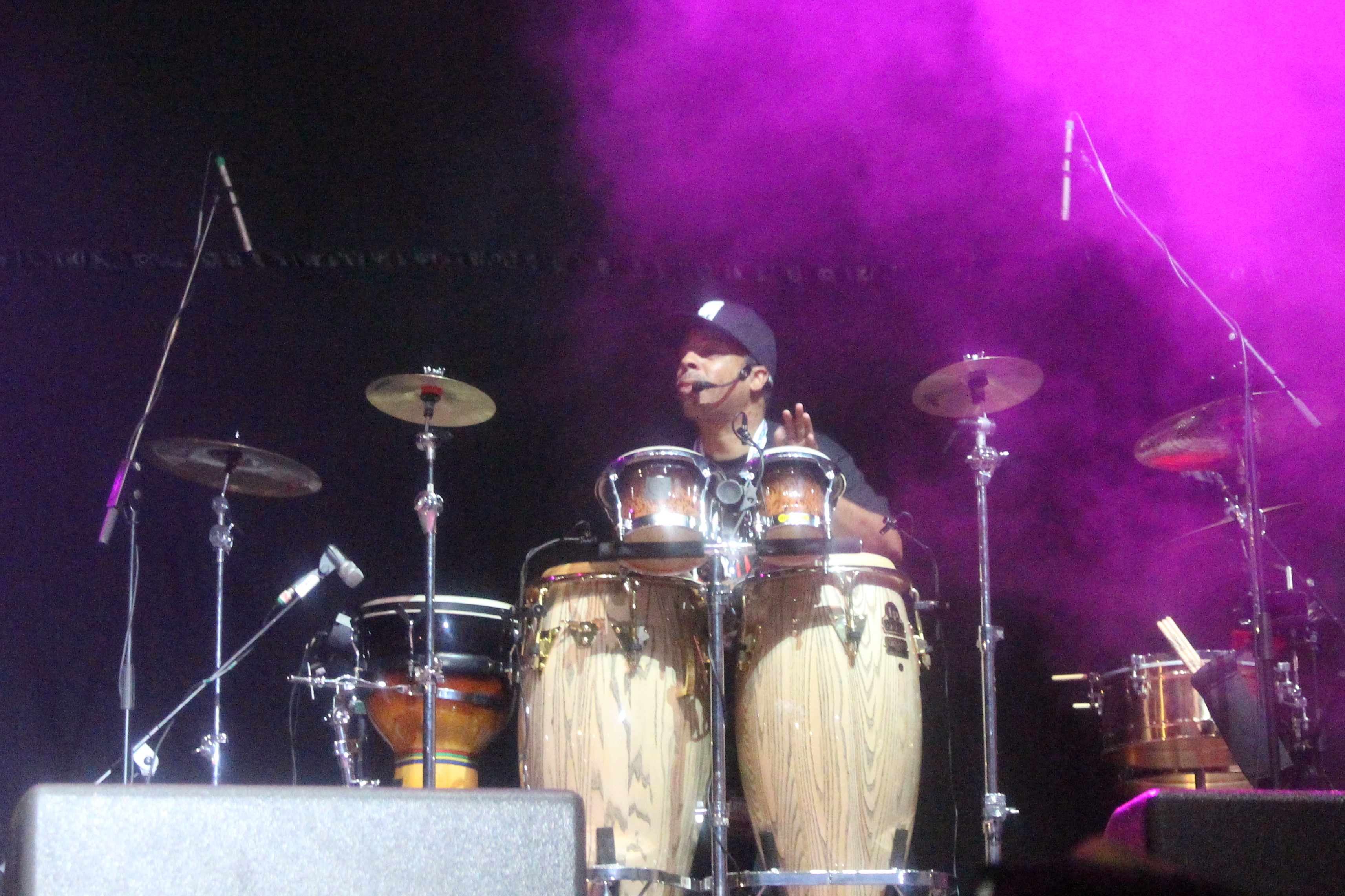 Festivalsommer This photo was created with the support of donations to Wikimedia Deutschland in the context of the CPB project "Festival Summer".